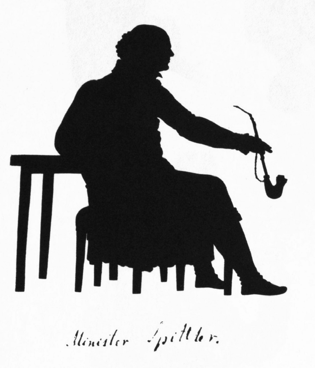 Luise Duttenhofer: Ludwig Timotheus von Spittler, 1752-1810, ein Großonkel von Luise Duttenhofer, Beischrift: „Minister Spittler“, schwarzer Scherenschnitt, Jahr unbekannt.